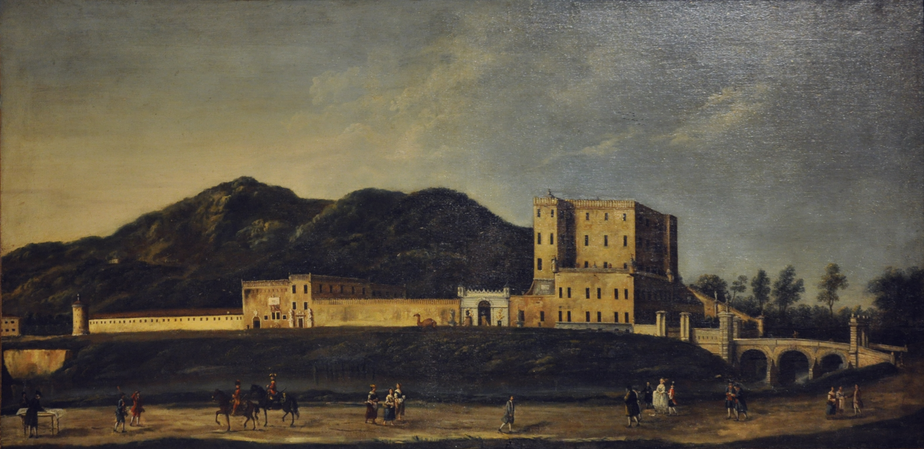 Schloss Catajo bei Padua, oberitalienisch, 18. Jh., Öl auf Leinwand Wien, Kunsthistorisches Museum, Sammlung alter Musikinstrumente (Neue Burg), Inv. Nr. KHM/GG 6565 (aus der Sammlung auf Schloss Catajo stammen zahlreiche Instrumente des Museums)